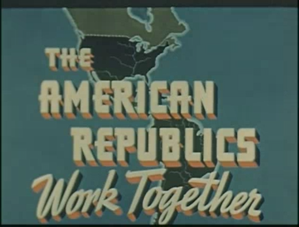 A Coordinator of Inter-American Affairs film reporting on a marketplace of goods from Latin American nations held at Macy's Department store in New York City's Herald Square.